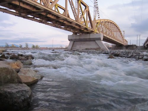 Orilla norte del Río Lontué con vista al Puente Ferroviario